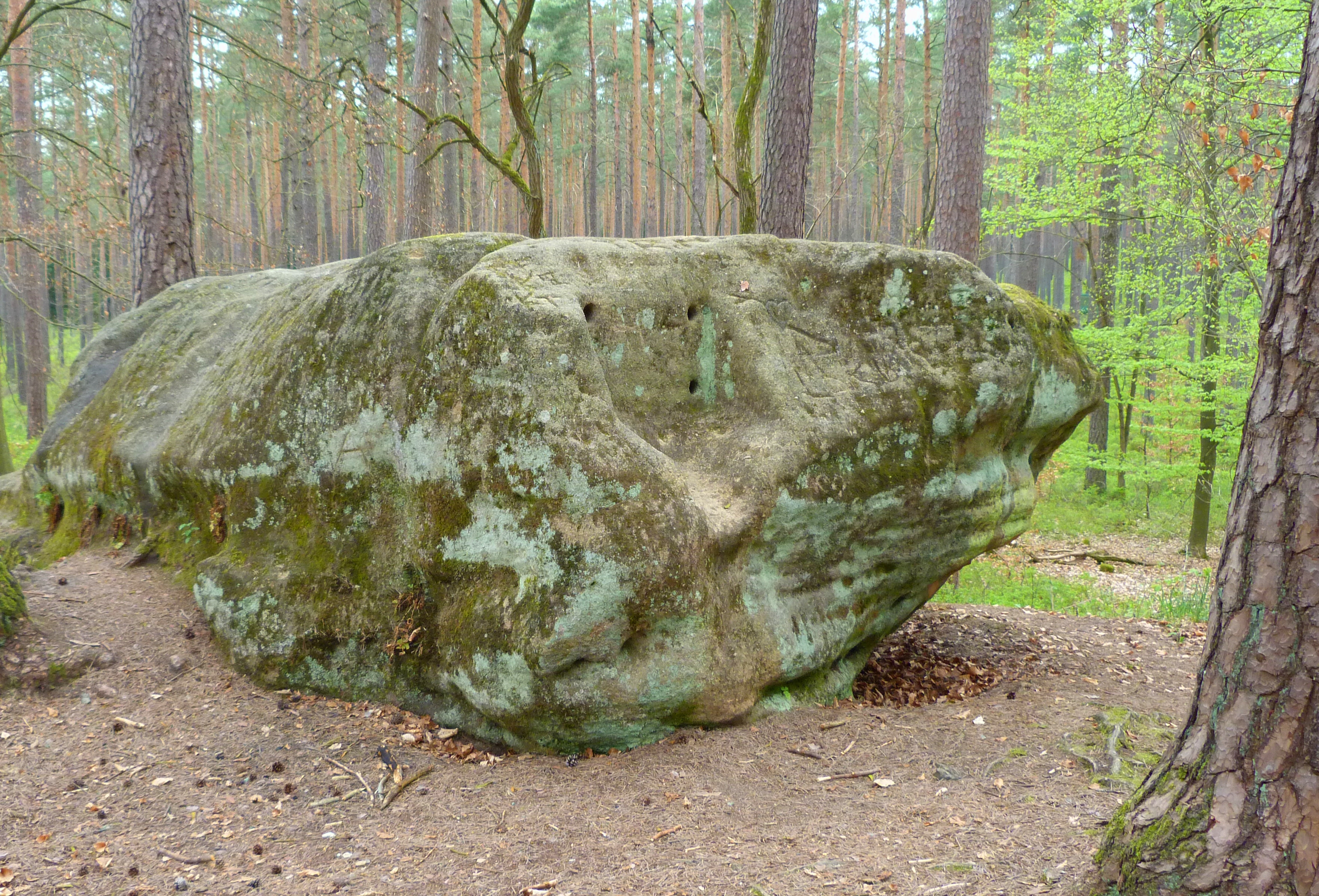 Der Druidenstein